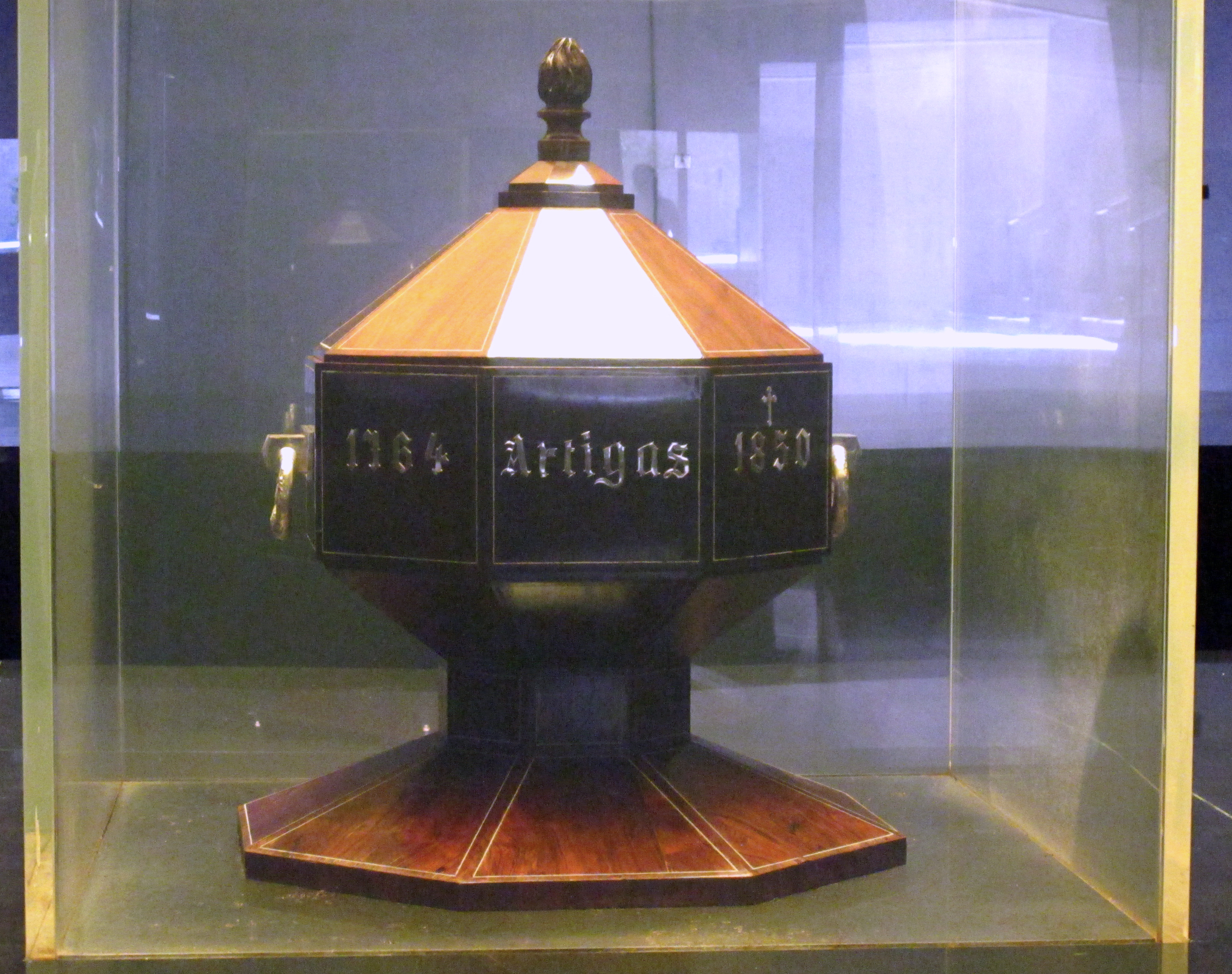 Urna con los restos del general José Gervasio Artigas en el Mausoleo erigido en su honor situado en la plaza de la Independencia de Montevideo (Uruguay).